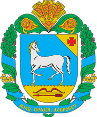 Герб Олександрійського району Кіровоградська область